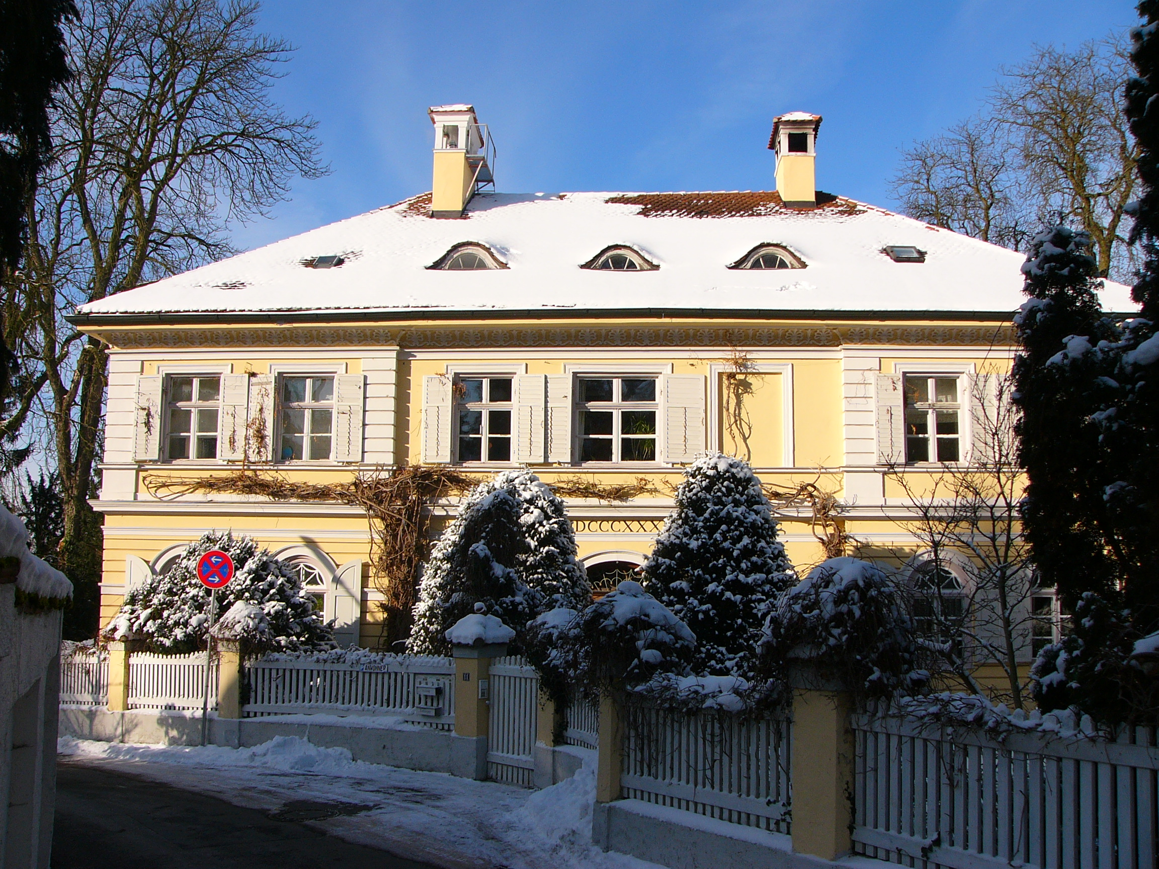 Dräxlmaierschlösschen; zweigeschossiger Walmdachbau mit Mittelrisalit, spätklassizistisch, von Johann Bernlochner, 1832; mit Ausstattung; rechteckiger Aussichtspavillon, mit toskanischen Säulen umstellt, z. Z. abgebaut und eingelagert; Park, teils im französischen, teils im englischen Gartenstil mit vielen seltenen Sträuchern und Baumarten.This is a photograph of an architectural monument.